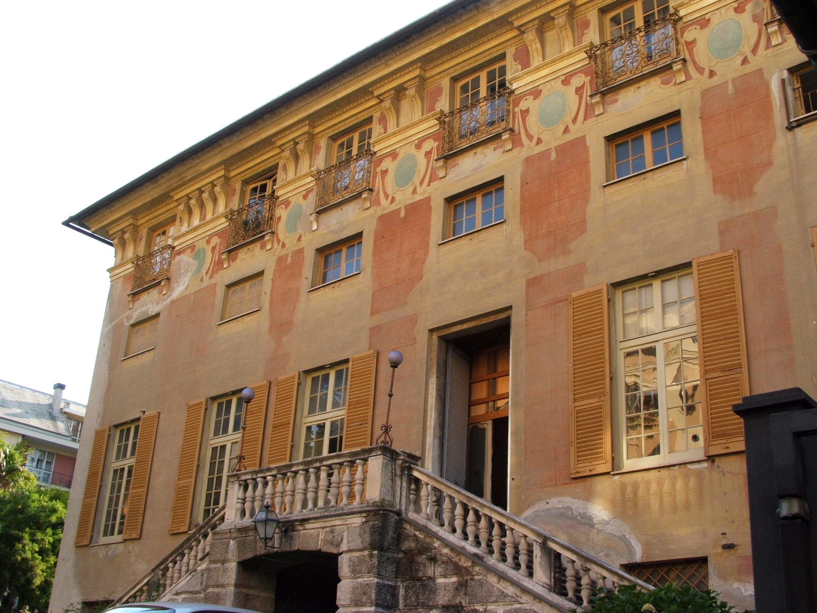 Genova, quartiere di Albaro - Palazzo Saluzzo oggi Mongiardino, nel quale abitò il poeta George Byron